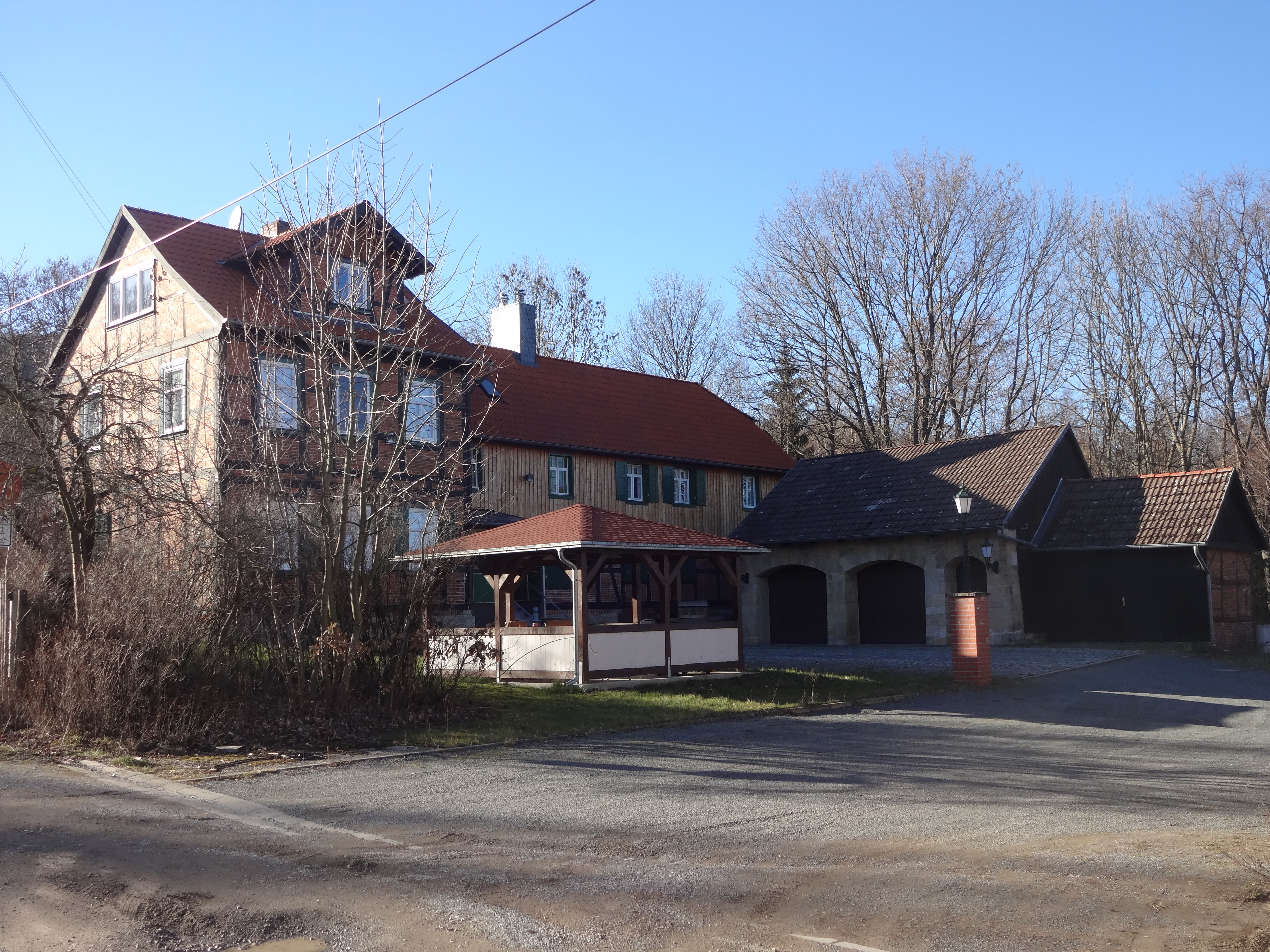 denkmalgeschütztes Forsthaus mit Jagdzeughaus in der Lindenallee 1 in Darlingerode